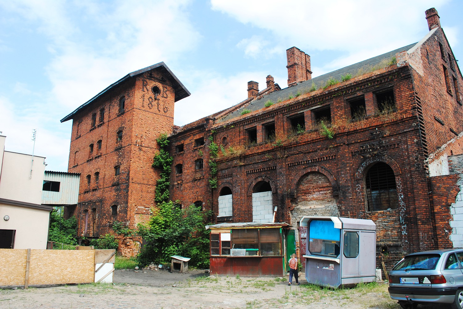 Browar Jerzego Bojańczyka we Włocławku - Magazyn 1 i 2